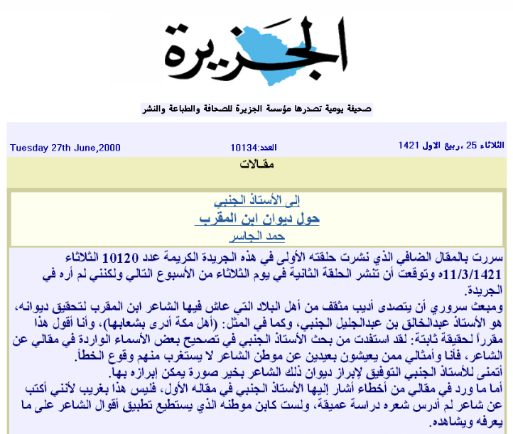 قصاصة من جريدة الجزيرة السعودية